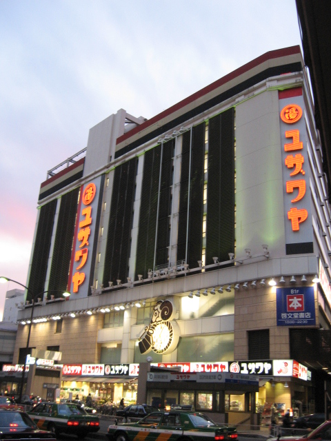 Yuzawaya_Kichijoji.